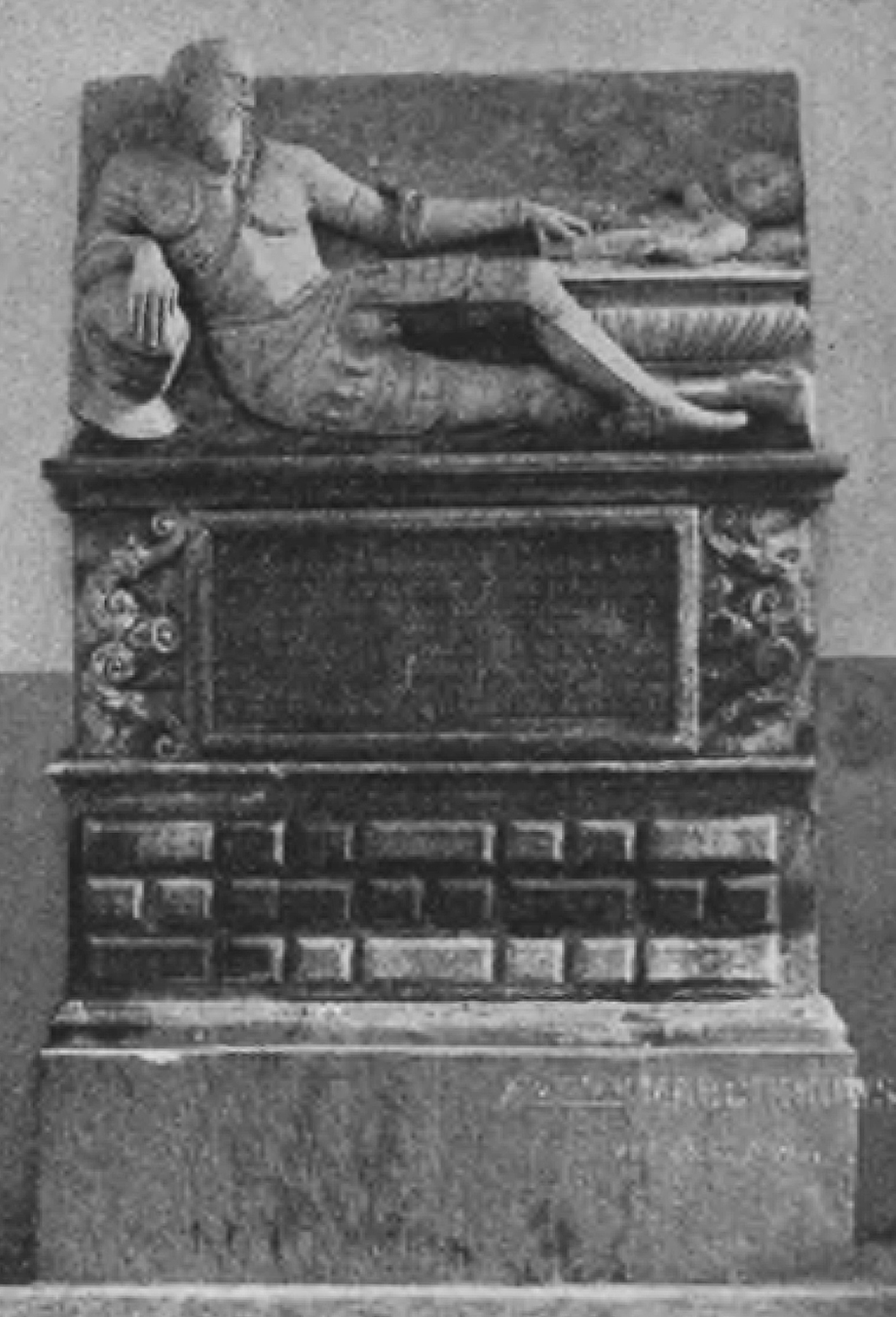 Grobowiec Łukasza Nagórskiego i jego synka Stanisława w kościele Św. Jana w Warszawie (nie zachował się).